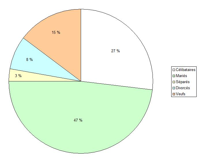 Statut marital de la population de Hartford (Michigan, Etats-Unis)